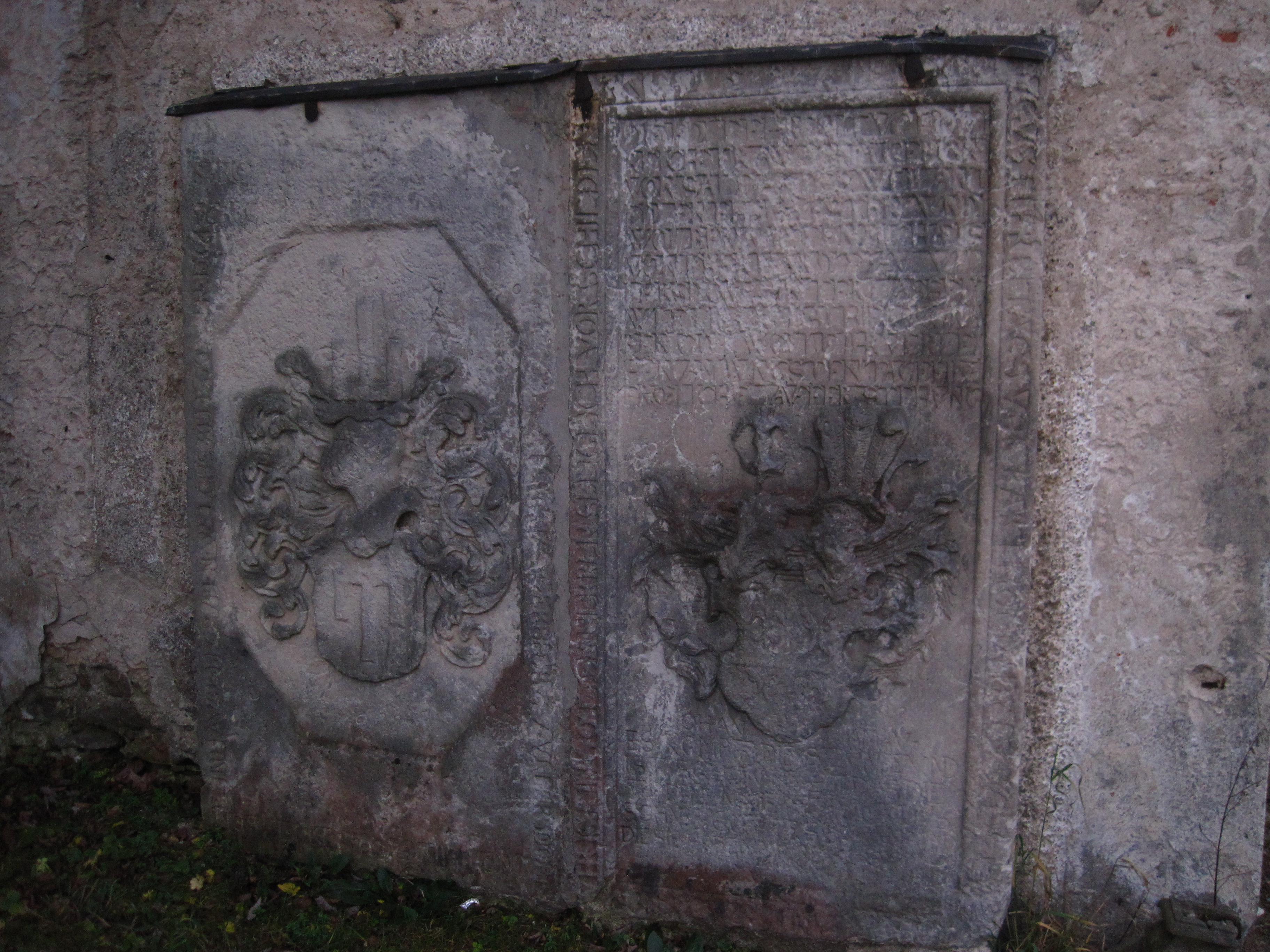 Kostel svatého Martina, střed obce, Dolní Oldřiš.